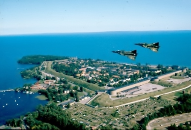 En rote AJ 37 Viggen ovanför Karlsborgs fästning